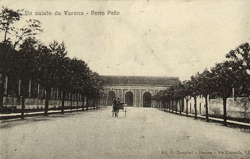 Stradone Porta Palio a Verona in una fotografia d'epoca